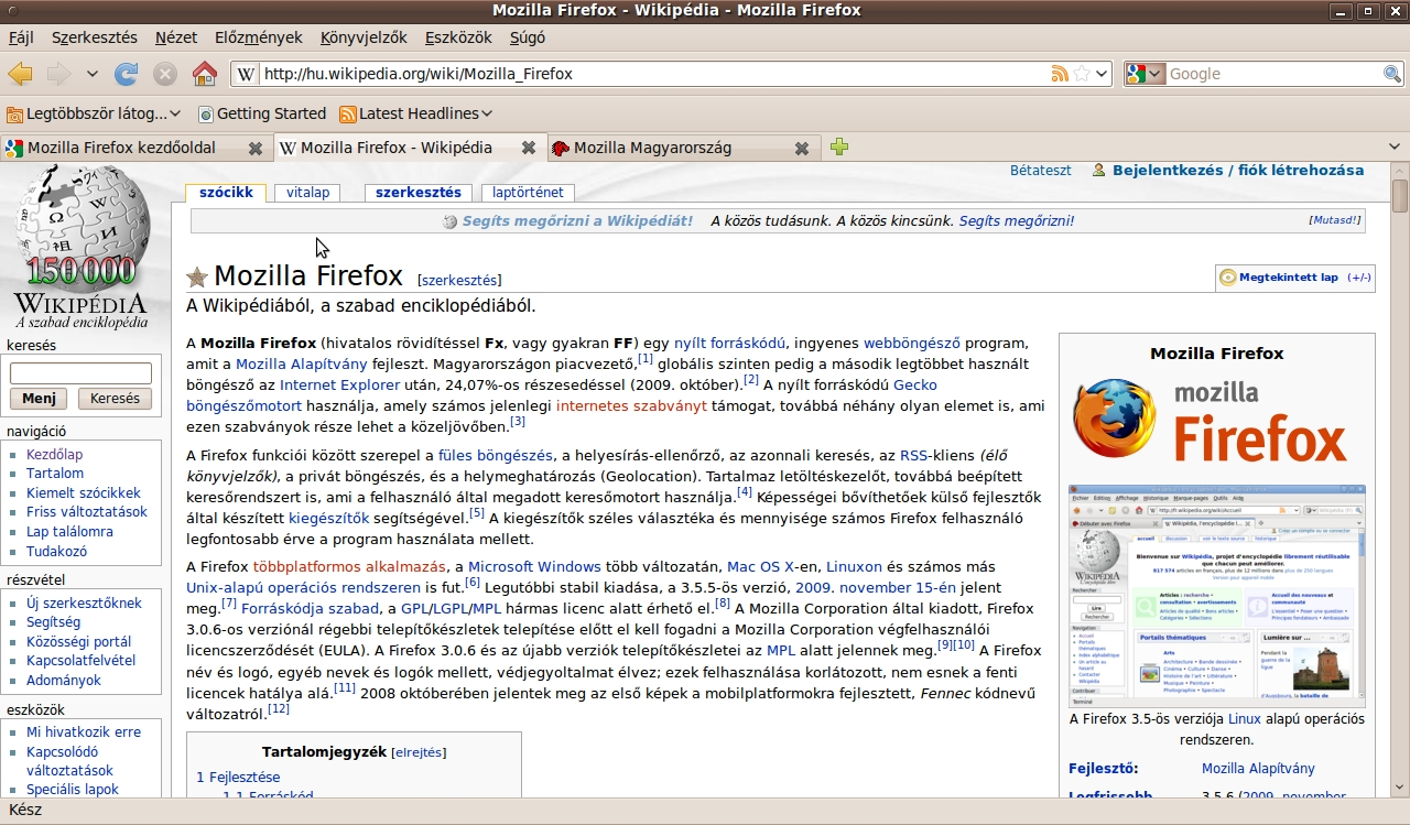 Kép a Mozilla Firefox 3.5.5 verzióról Ubuntu 9.10 operációs rendszeren